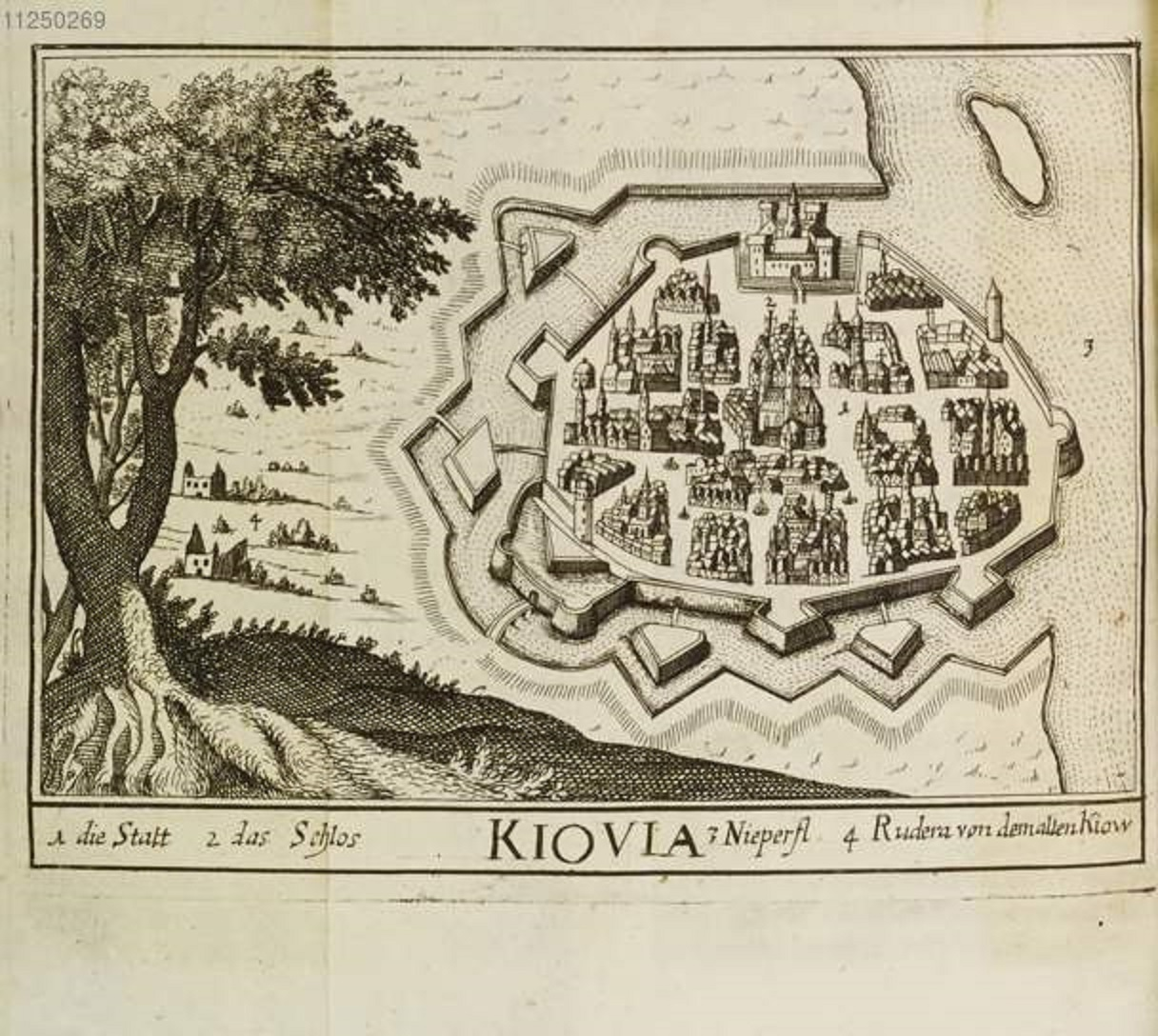 План міста та замку в Києві. А - місто, 2 - замок, 4 - руїни старого міста. В тексті подано, що Київ засновано 86 р. руським князем Києм.